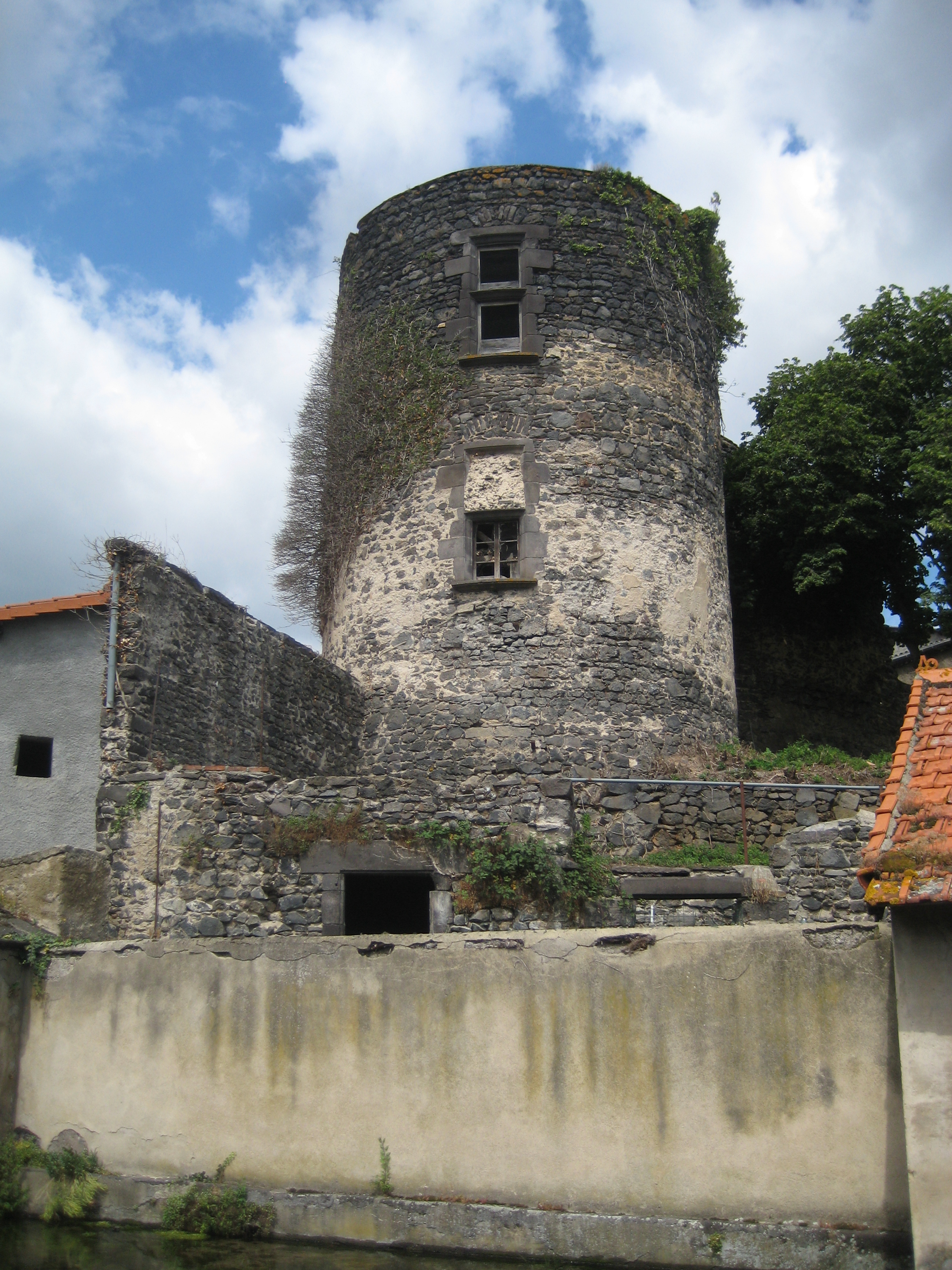 Une des tours, vestige du château de Marsat